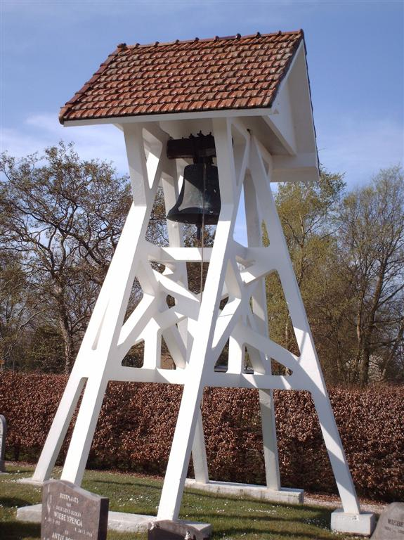 Klokkenstoel van beton in Rottum, Friesland